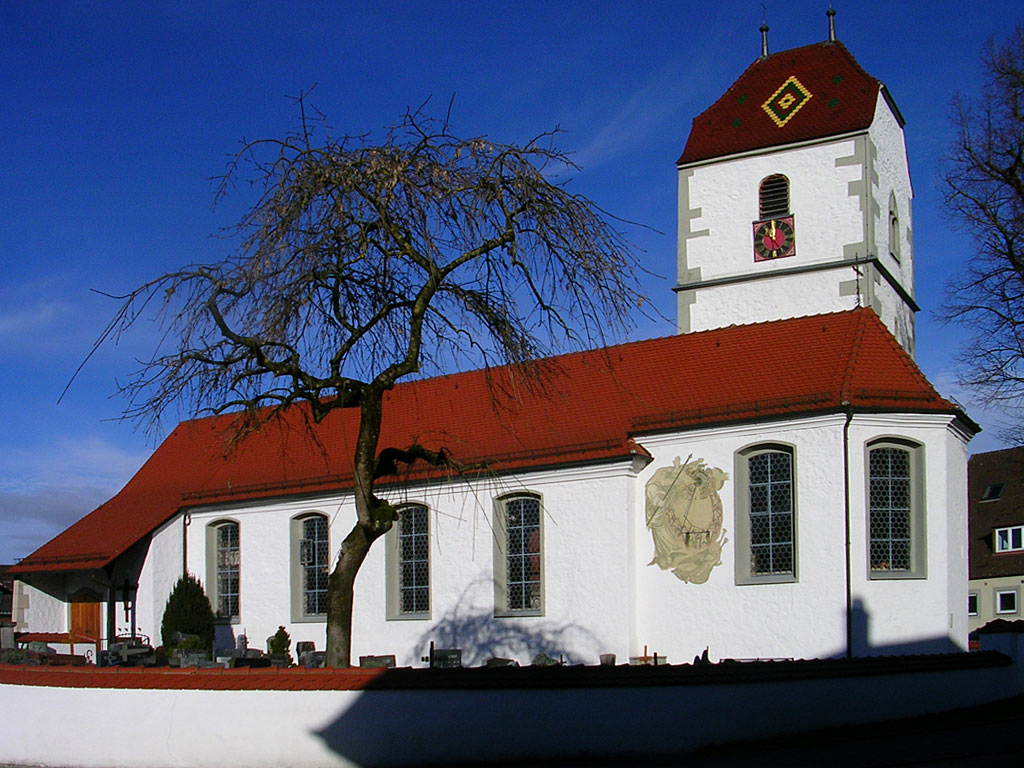 Pfarrkirche Schnetzenhausen mit Sonnenuhr des Künstlers Alfred Vollmar